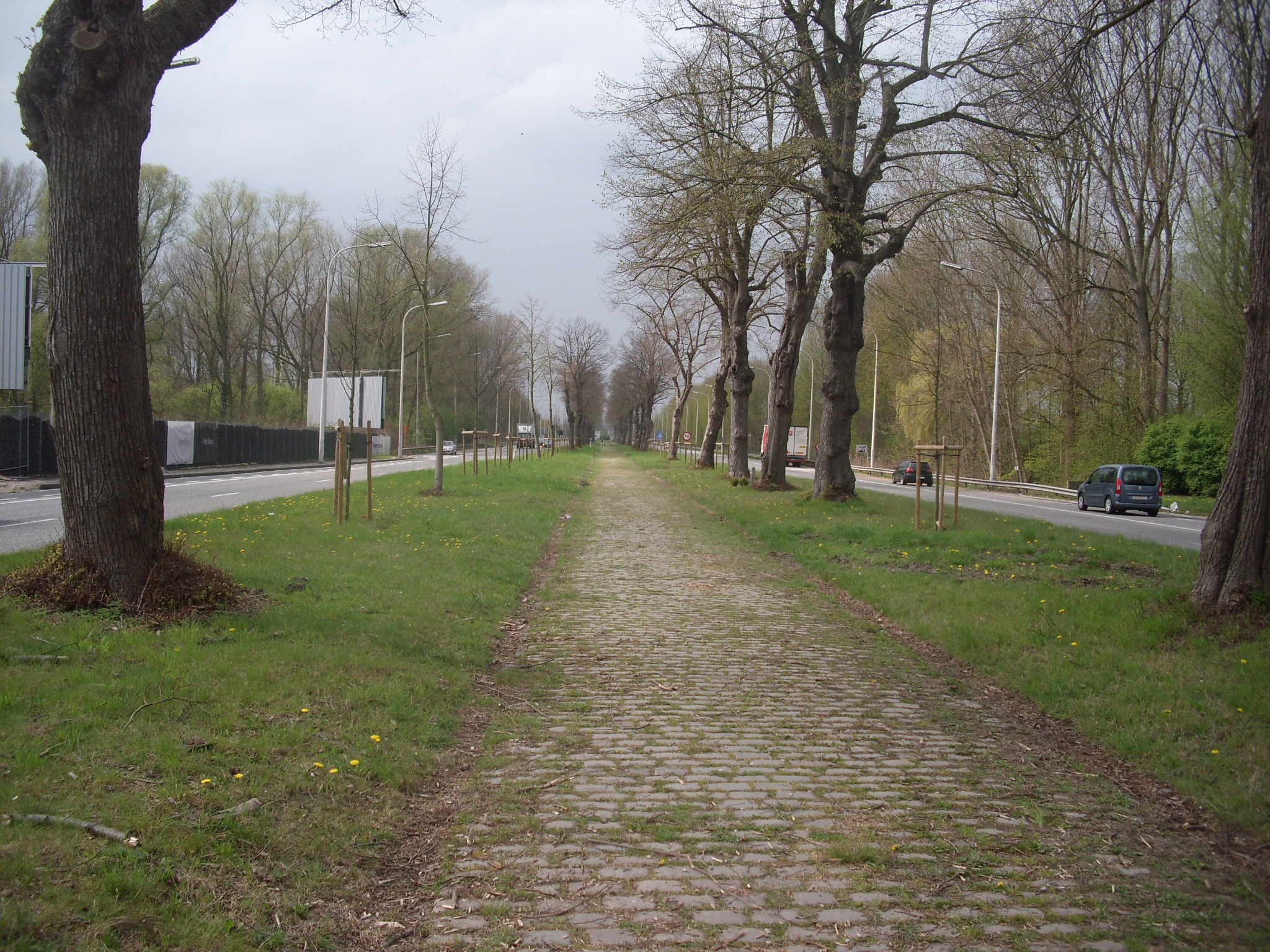 Drongensesteenweg (N466) tussen Gent en Drongen. In het midden de oude steenweg. Links en rechts de beide rijrichtingen van de huidige "steenweg". - Gent - Oost-Vlaanderen - België